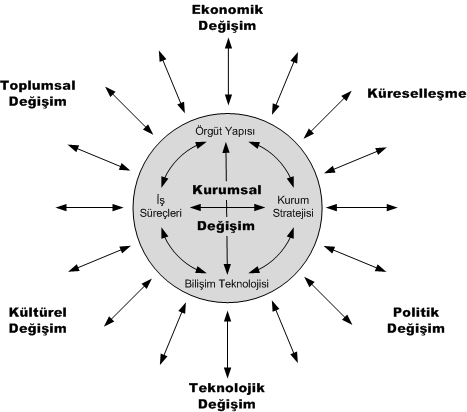 İşletme-çevre-teknoloji ilişkisi